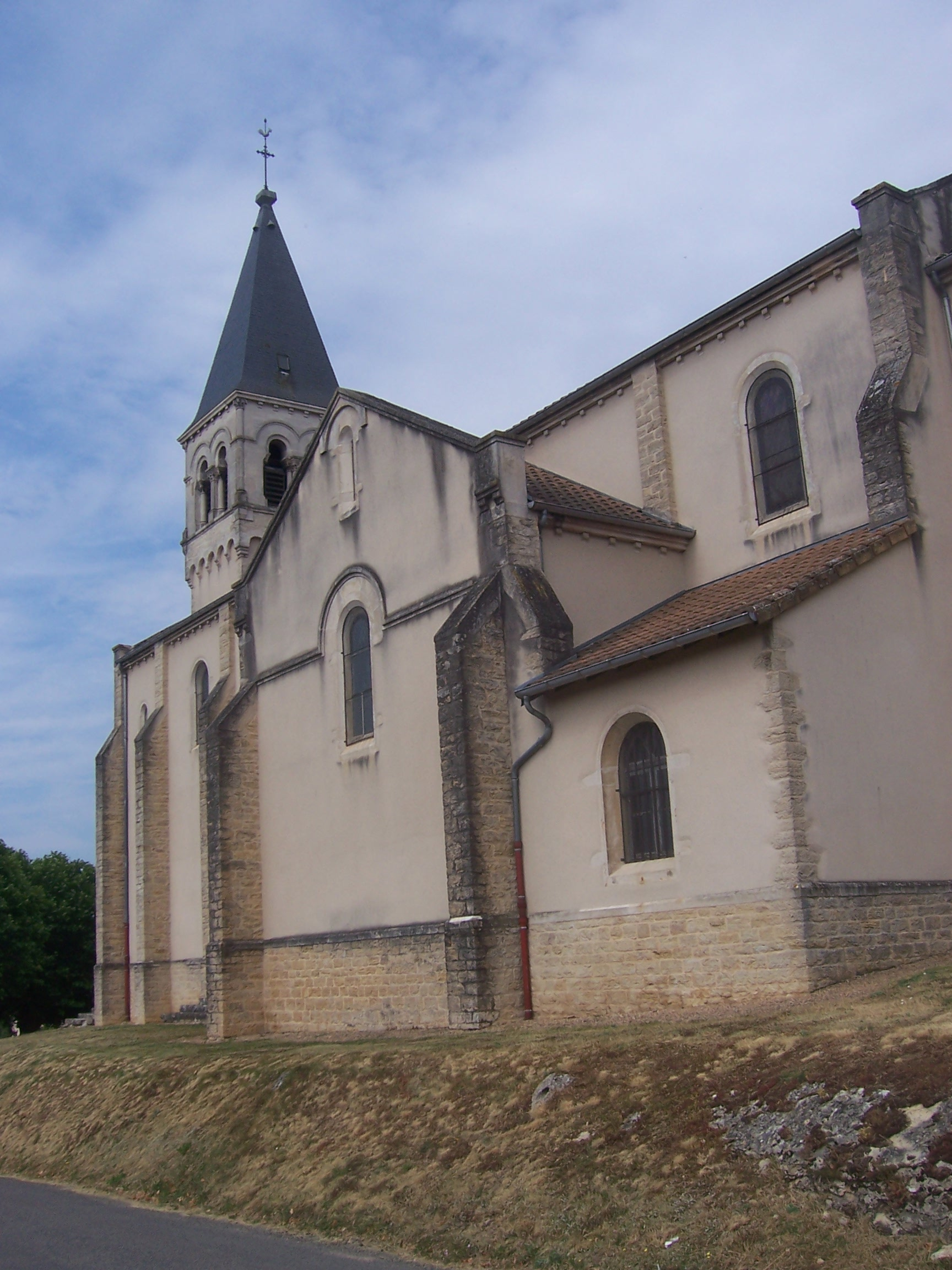 Eglise de L'Abergement-de-Cuisery